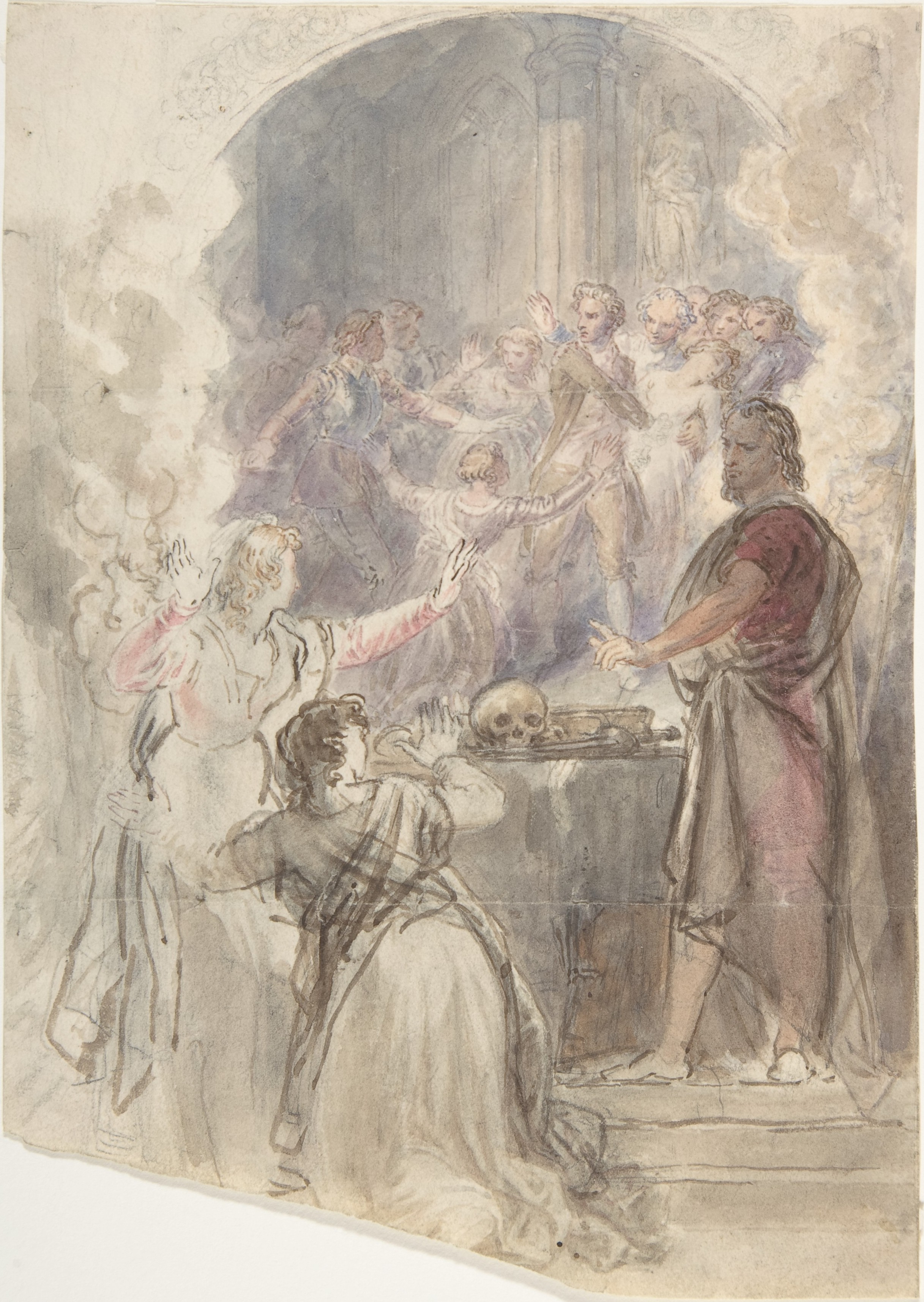 Drawing; Drawings